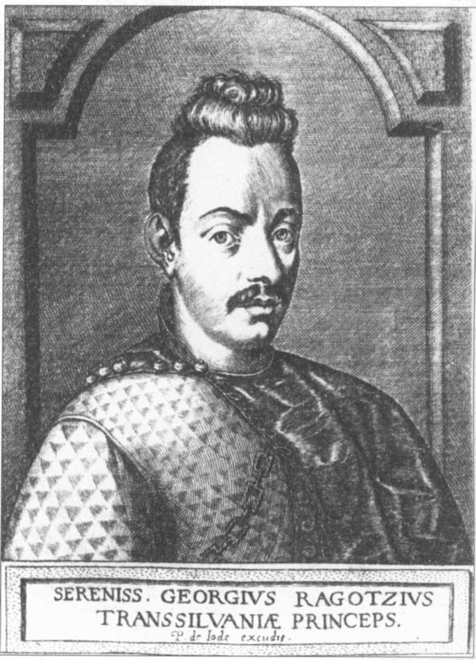 Jerzy I. Rakoczy (I. Rákóczi György), duke of Transylvania (source Rákóczi